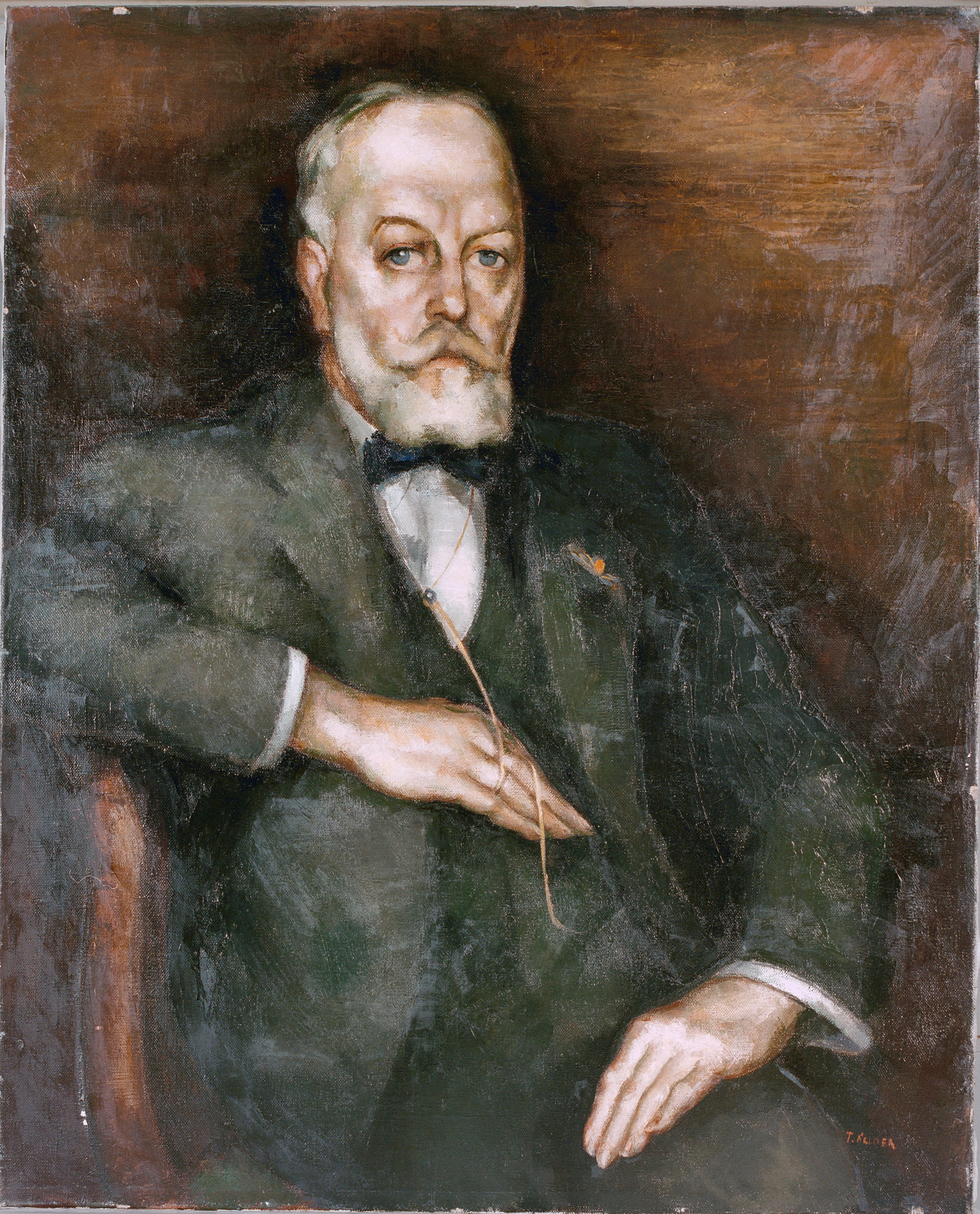 Hernhutterscomplex: Interieur, schilderij met portret van de oud-directeur van de Rijks -dienst voor de Monumentenzorg de heer nl: Jan Kalf (monumentenzorg) (opmerking: Portret bevindt zich in het kantoor te Zeist, geschilderd door Toon Kelder 1939)